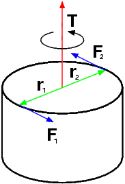 Momento torcente di una coppia di forze. Immagine creata da me stesso con il programma open source "Xfig". Nuova versione (esteticamente più curata) creata da Lorenzo Paulatto (Utente:Paulatz) il 20 marzo 2006 con xfig. Rilasciata nel pubblico dominio.